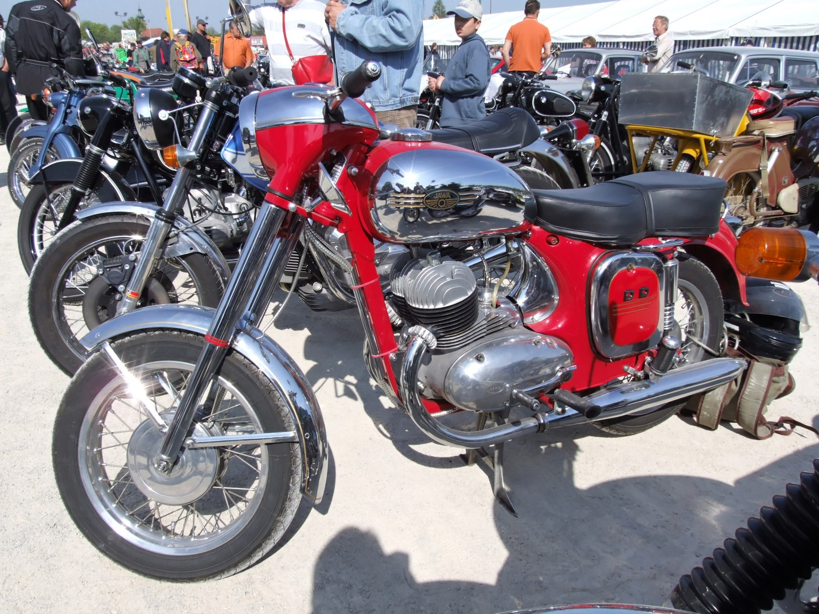 Quelle: selbst fotografiert, 04/2007 Fotograf: Späth Chr.